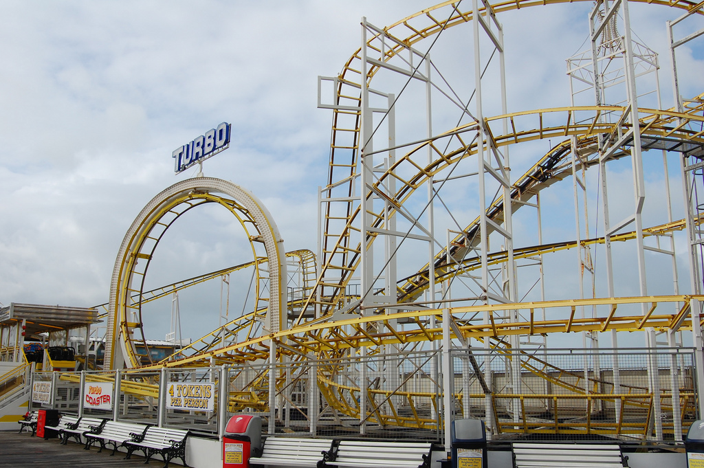 Turbo, roller-coaster Pinfari possédant un looping à Brighton Pier, Royaume Uni